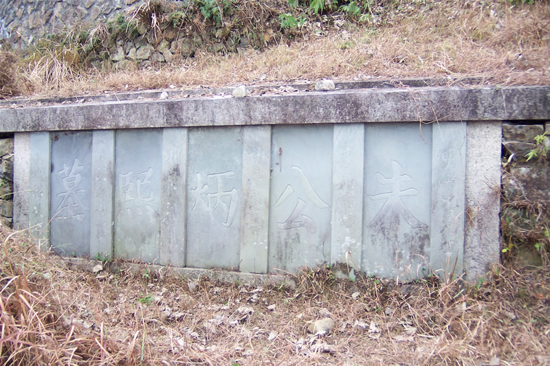 朱公炳熙之墓。